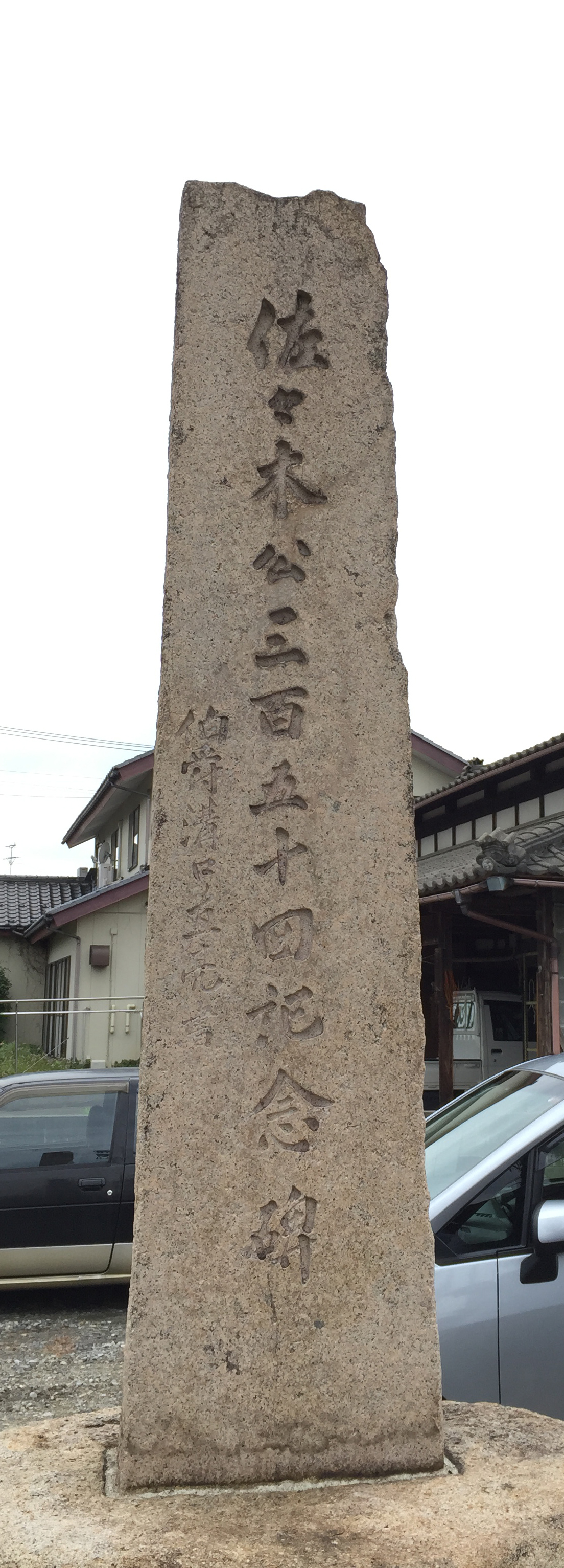 天明のころ（１７８１～８９）佐々木氏(重家公)二百回忌に当たり、藩主溝ロ家より納められた石碑